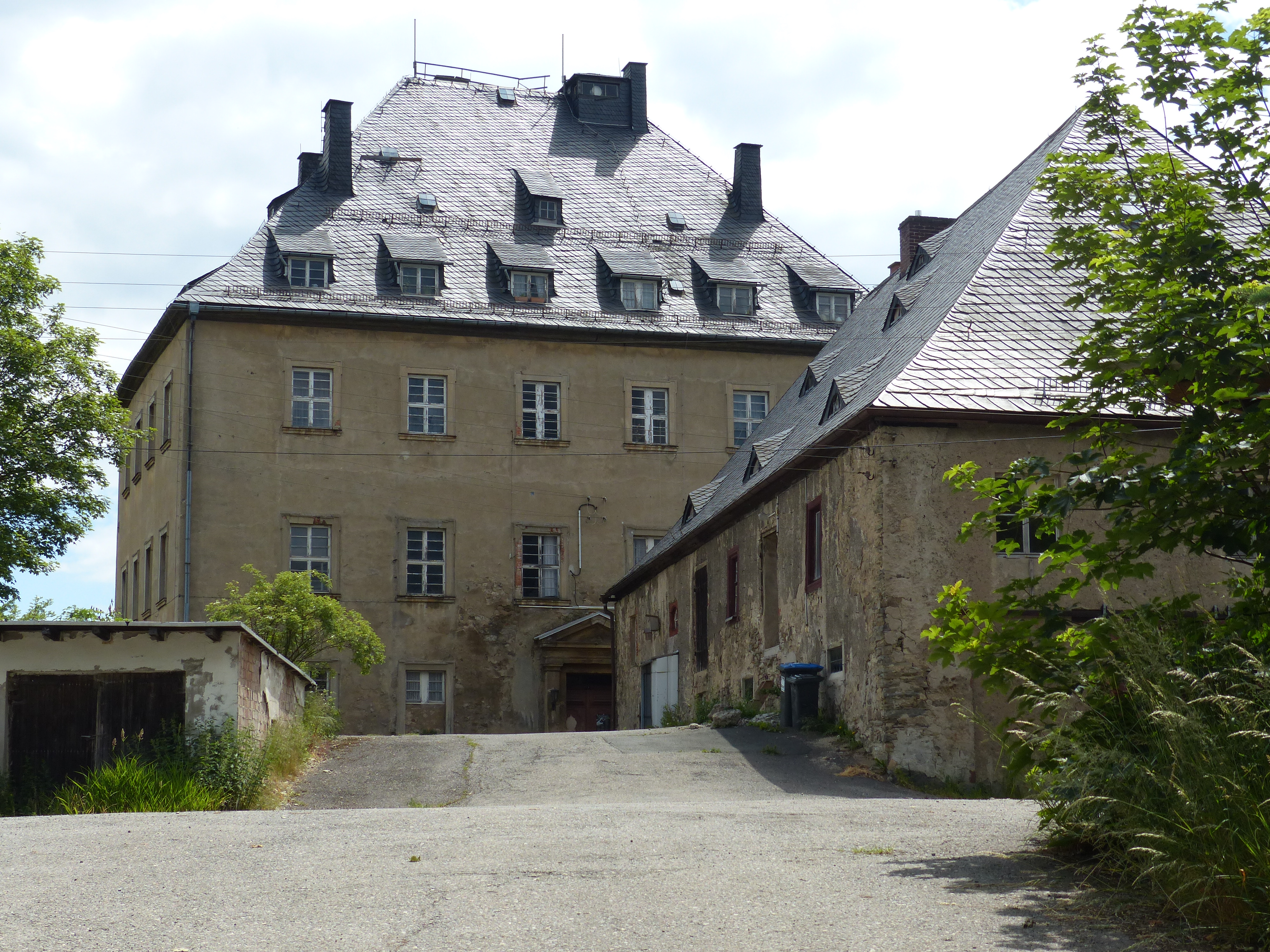 Schloss Hirschberg, Saale-Orla-Kreis